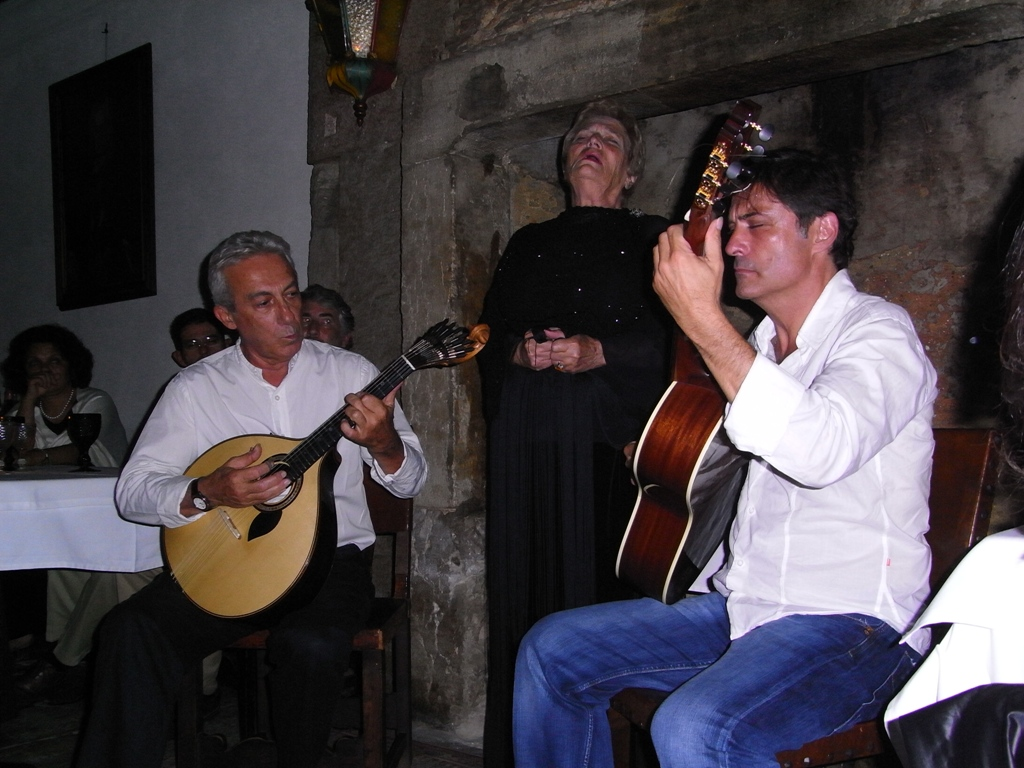 Celeste Rodrigues cantando Fado en el Restaurante "Casa de Linhares"